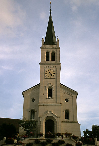 Kirche von Les Brenets